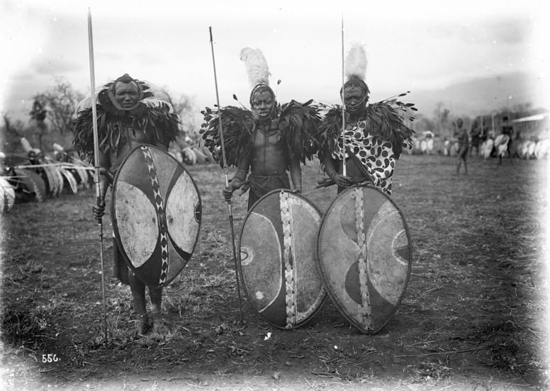 Massaikrieger